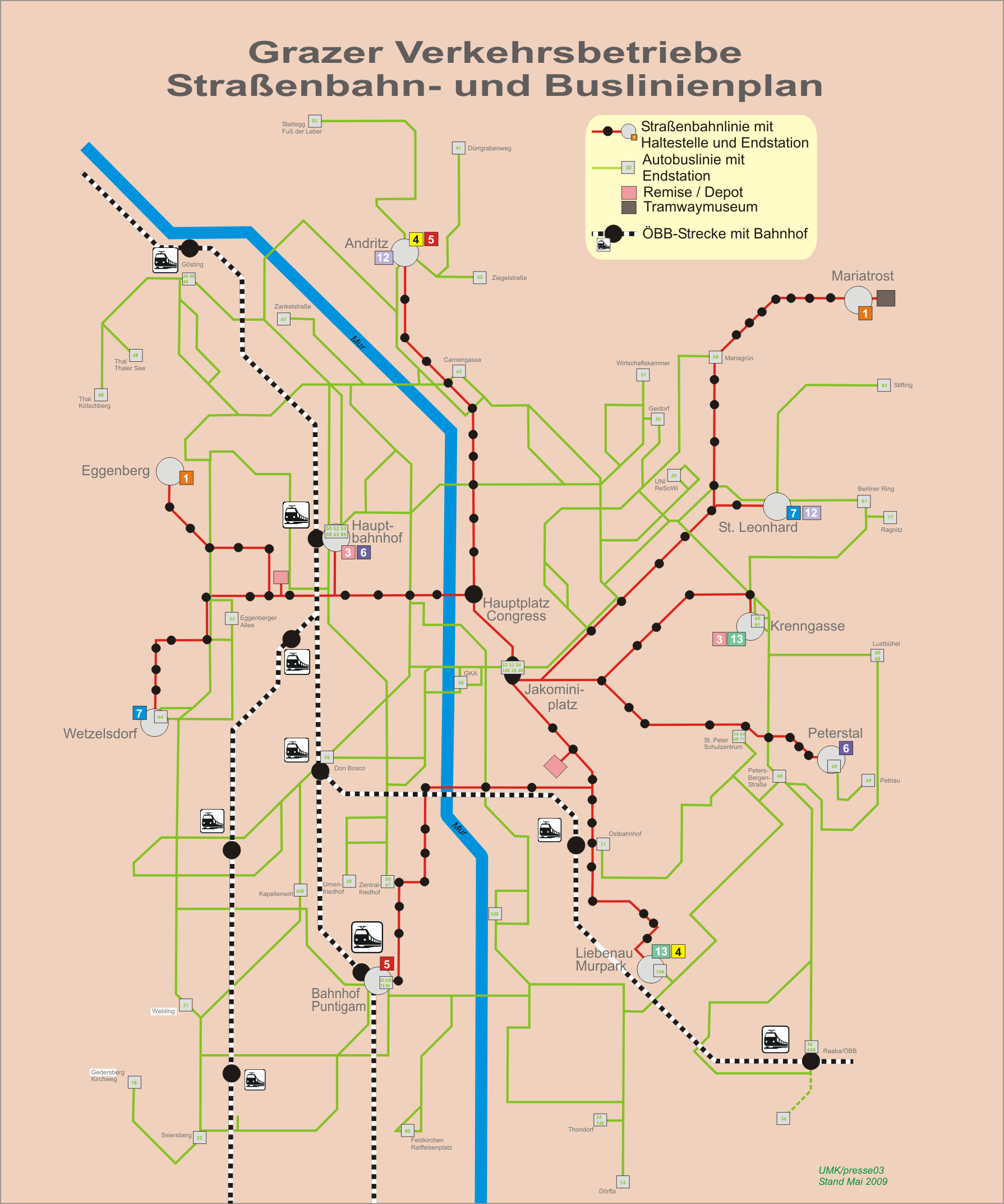 Grazer Verkehrsbetriebe GVB - vereinfachter Straßenbahn- und Buslinienplan